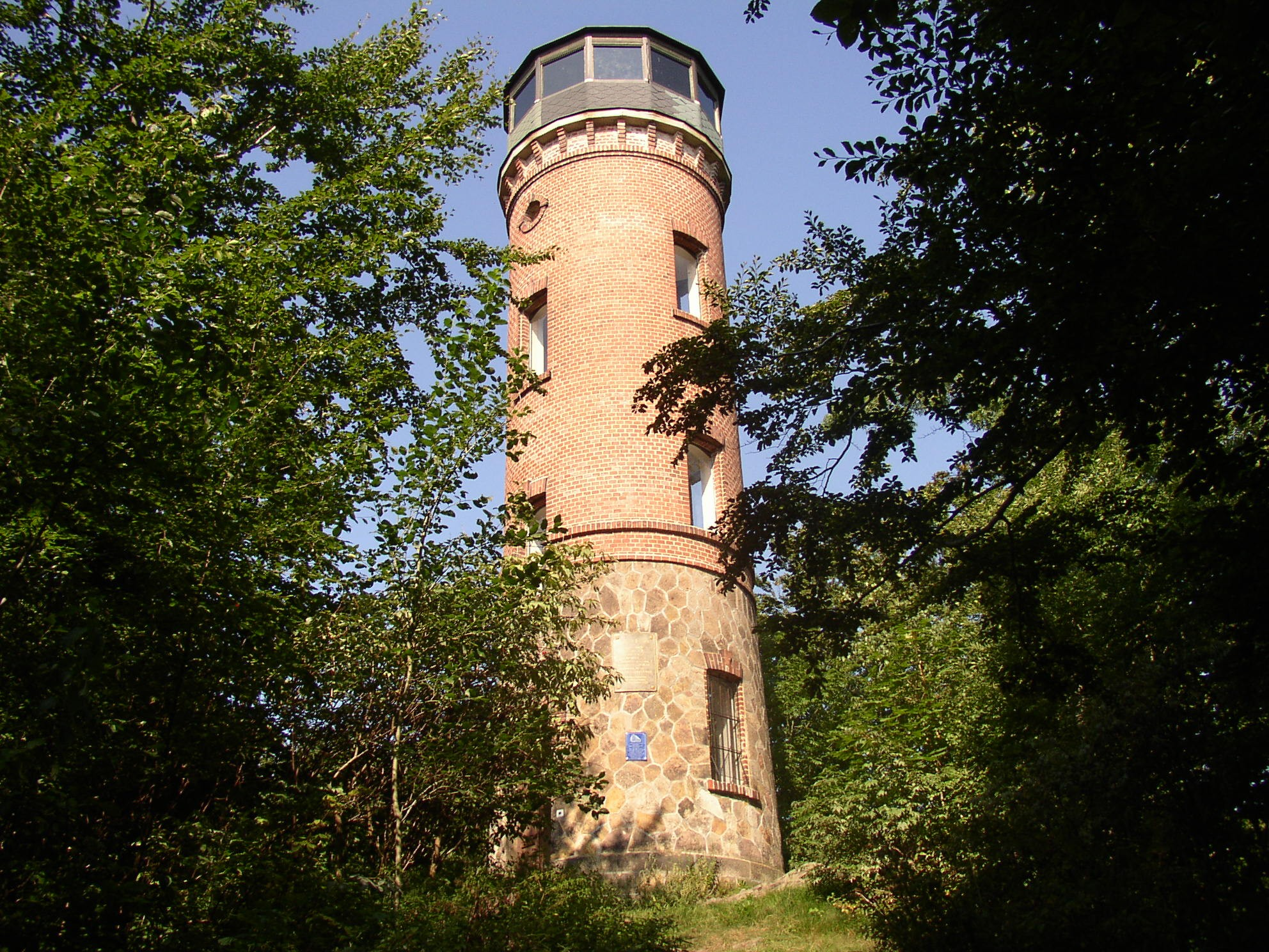 Rozhledna na Dymníku